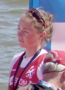 Wianka van Dorp, Ruder-EM 2016